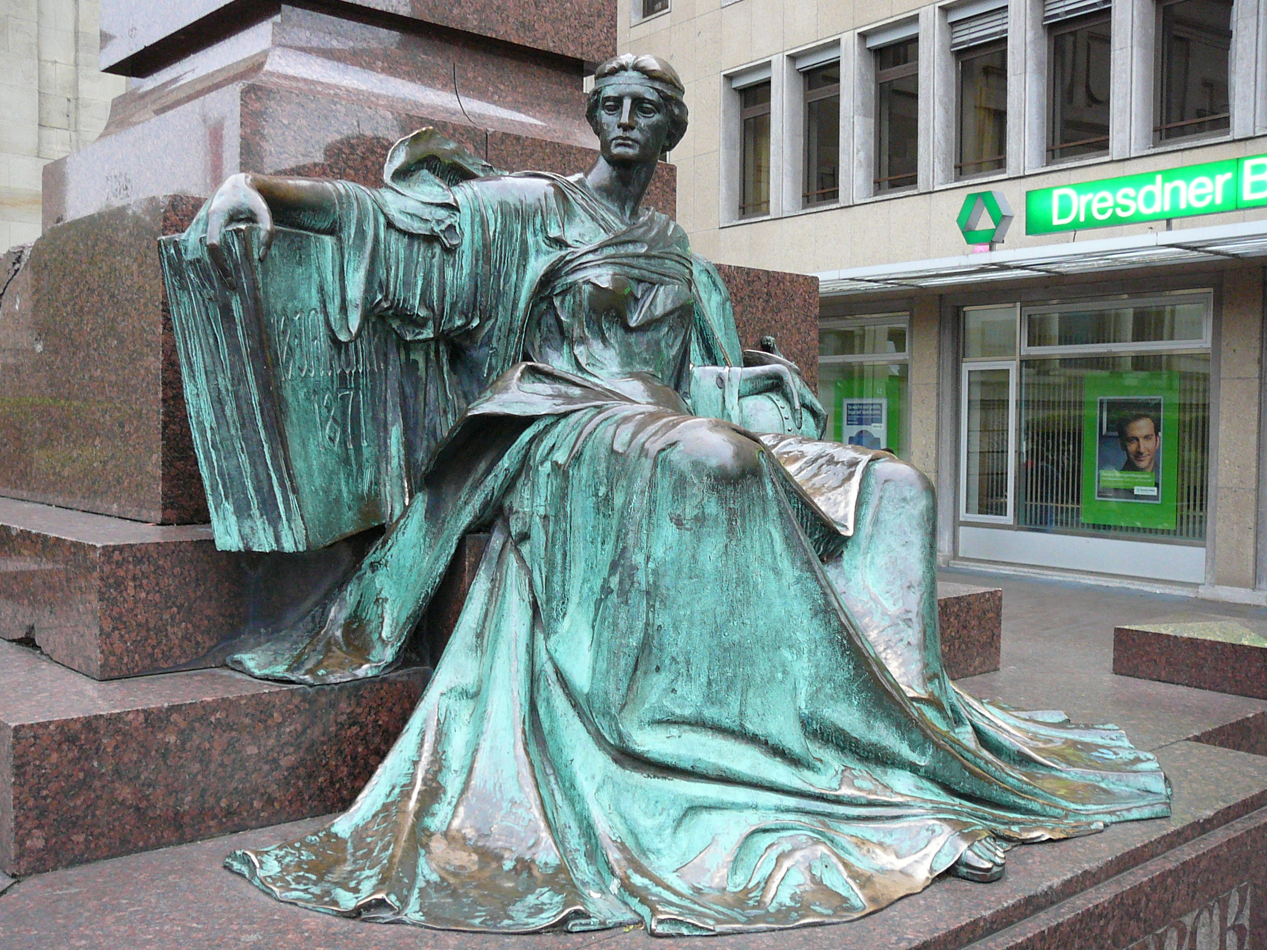 Sitzbildnis der Muse Klio am Bismarckdenkmal in Wuppertal-Barmen, Geschwister-Scholl-Platz